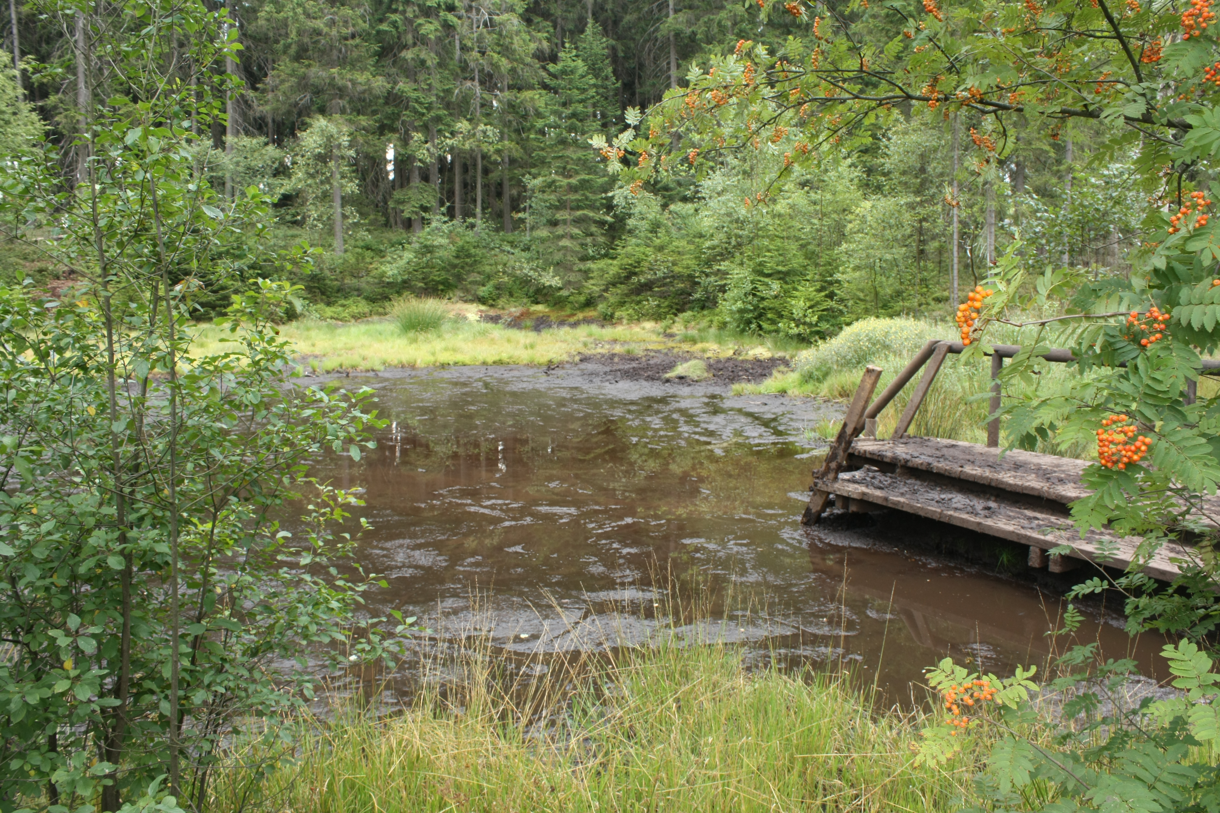 Naturmoorbad in Warmensteinach (Ortsteil Fleckl)